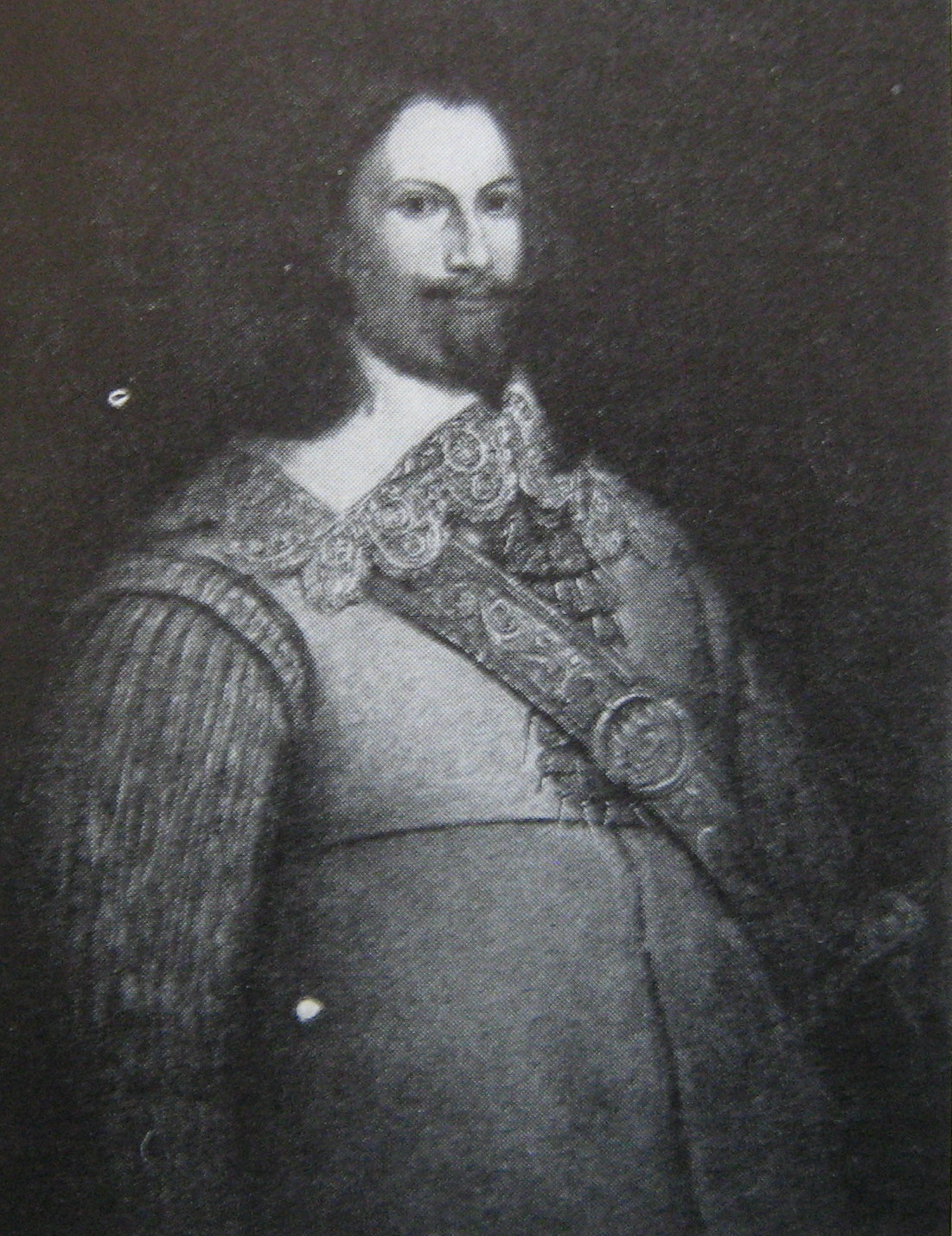 Nils Brahe